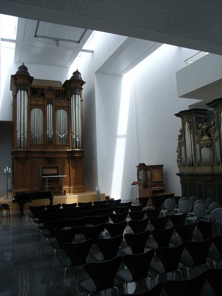 Orgel ART Museum, Windesheim